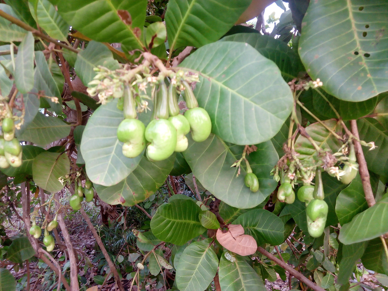 acajou fruits à Pobé